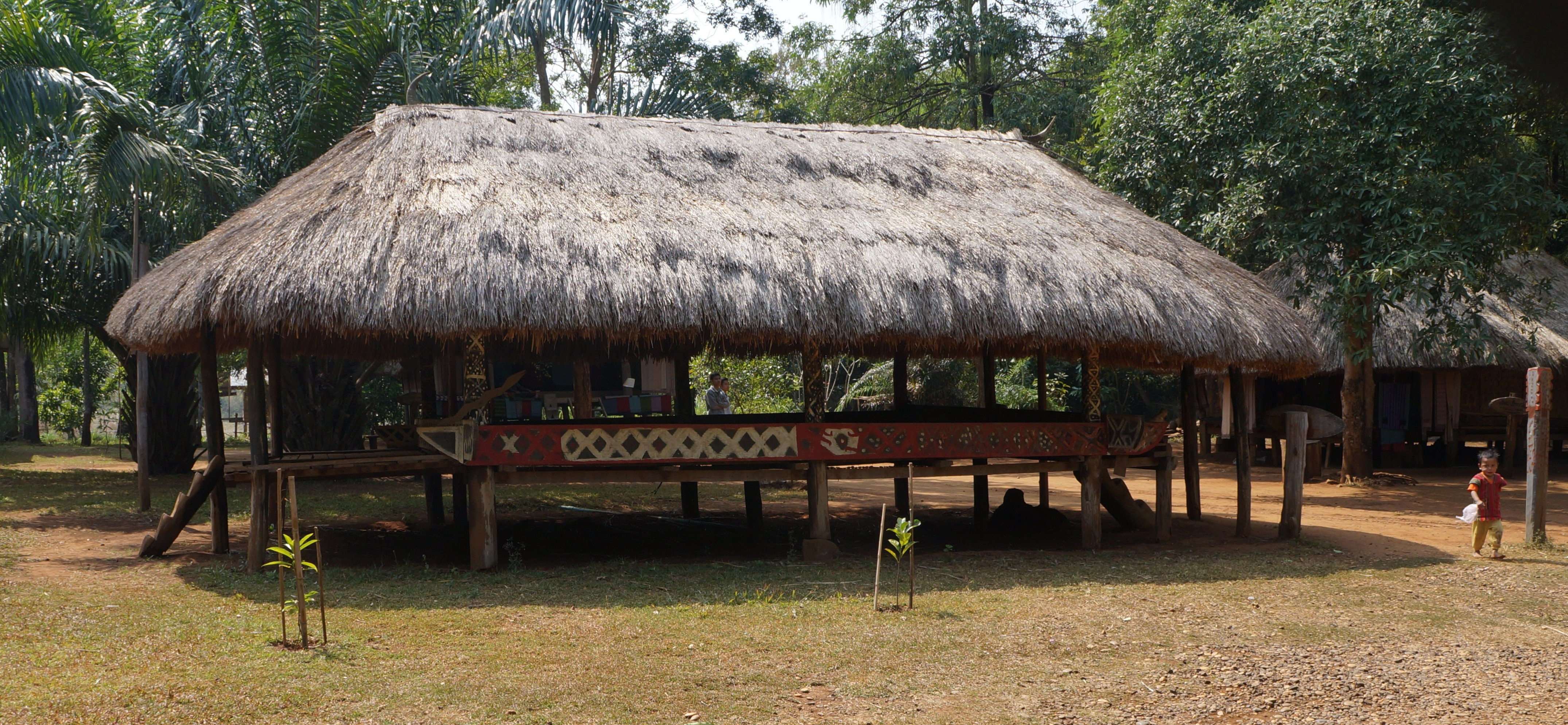 La maison communale des katu. Laos, Village des tisserands de Ban Lao Ngam, le Plateau des Boloven